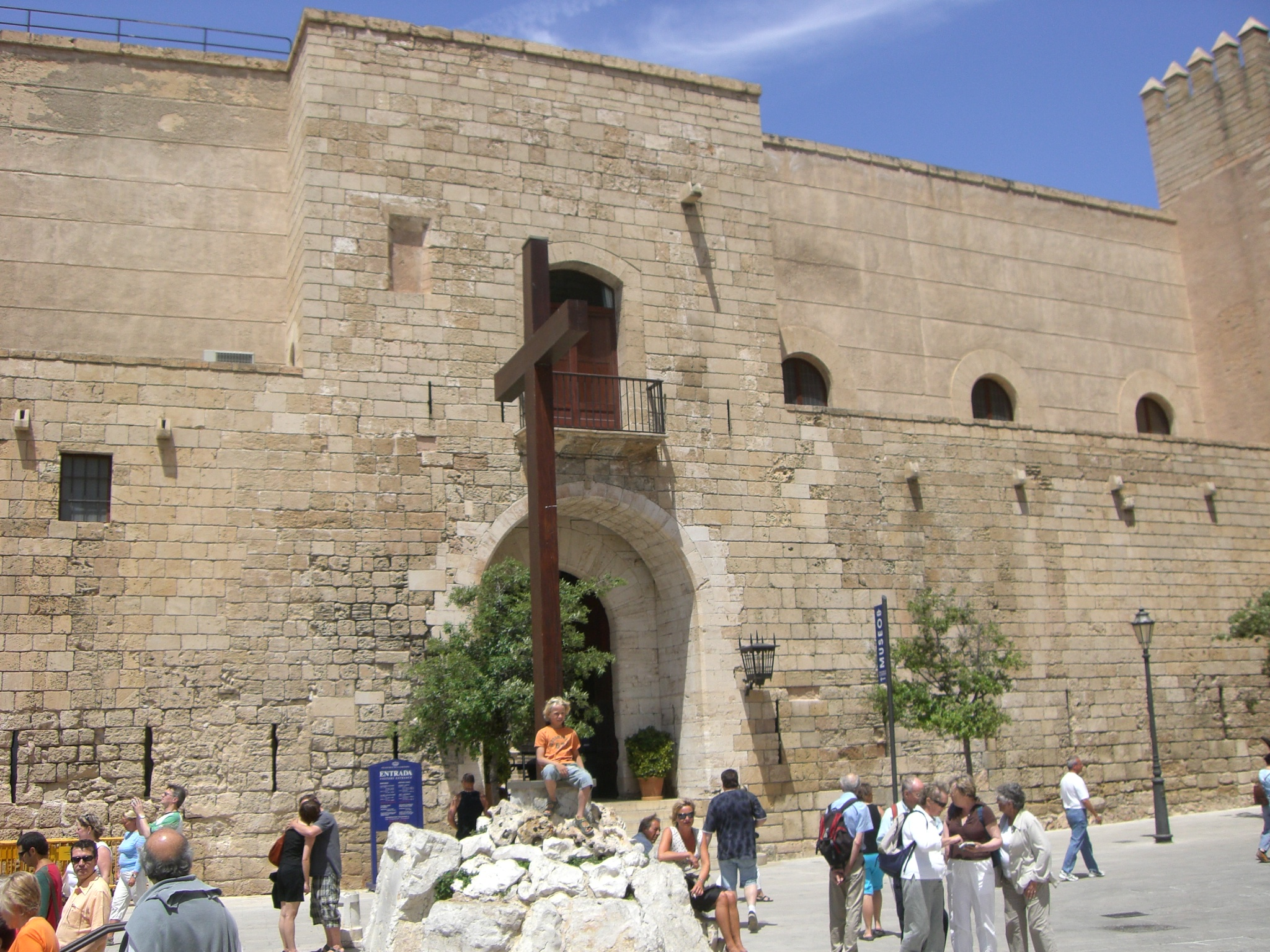 Palau de l'Almudaina, a Palma.